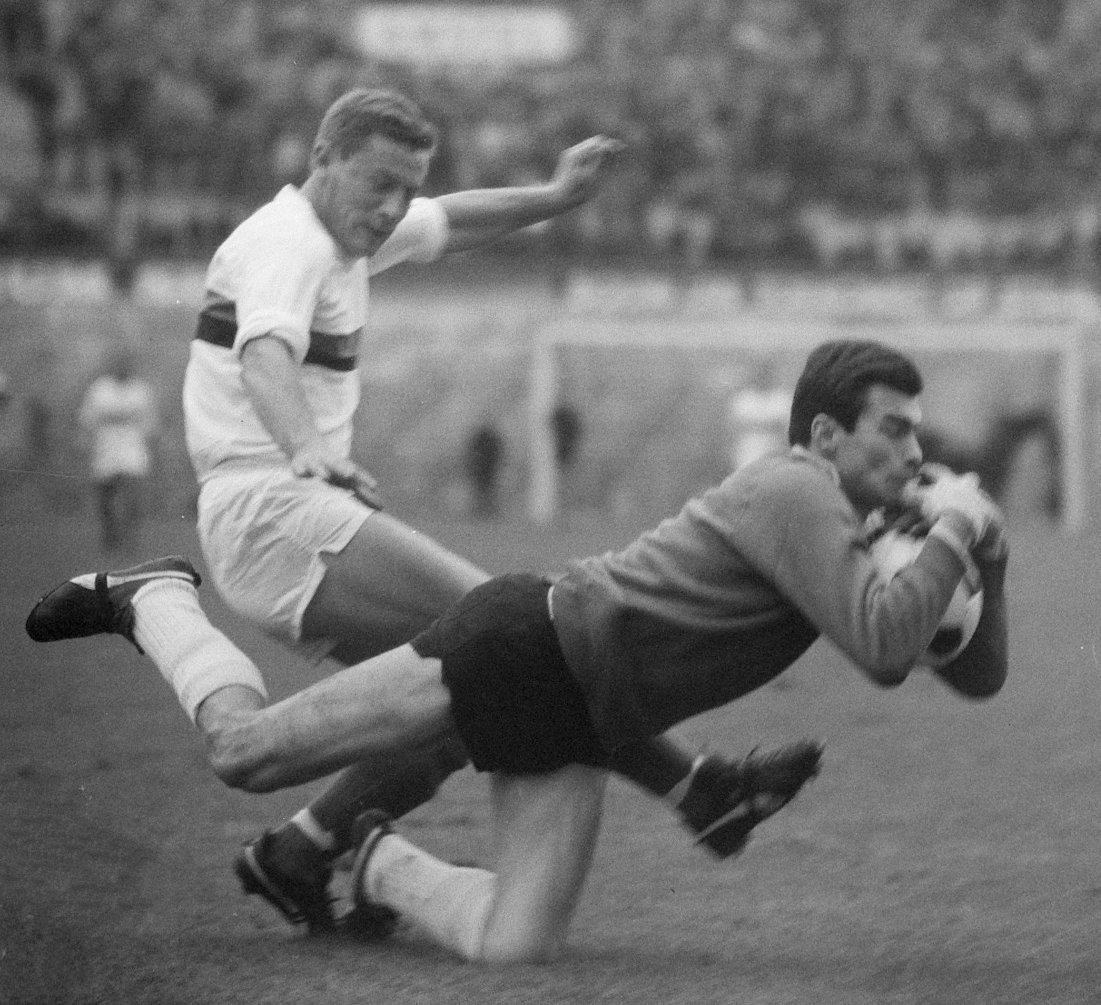 Voetbalwedstrijd DWS tegen PSV te Amsterdam: 2-2; Geurtsen in duel met keeper Strich (PSV)